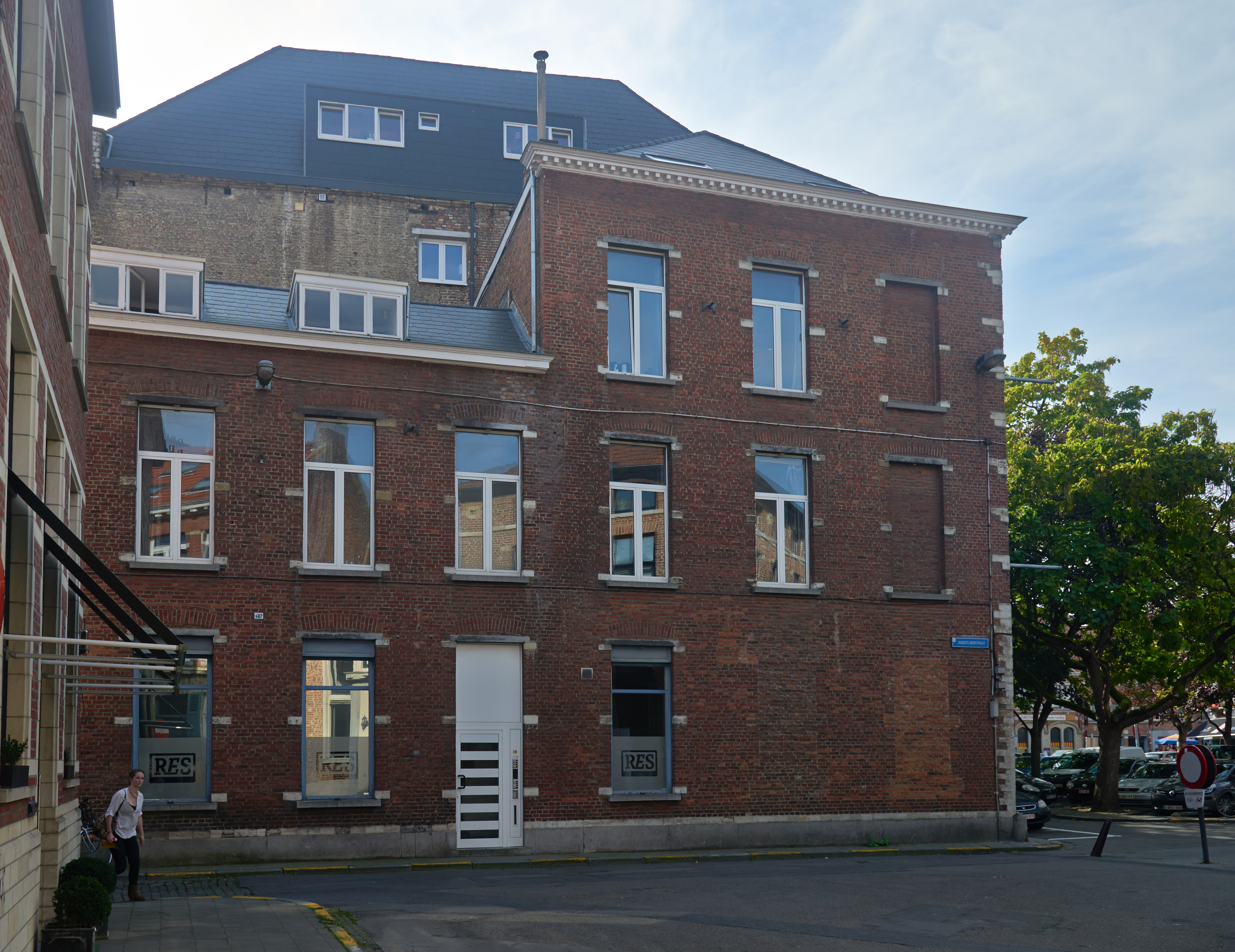 Leuven, Augustijnenstraat 19. Hetzelfde gebouw als Vismarkt 10B